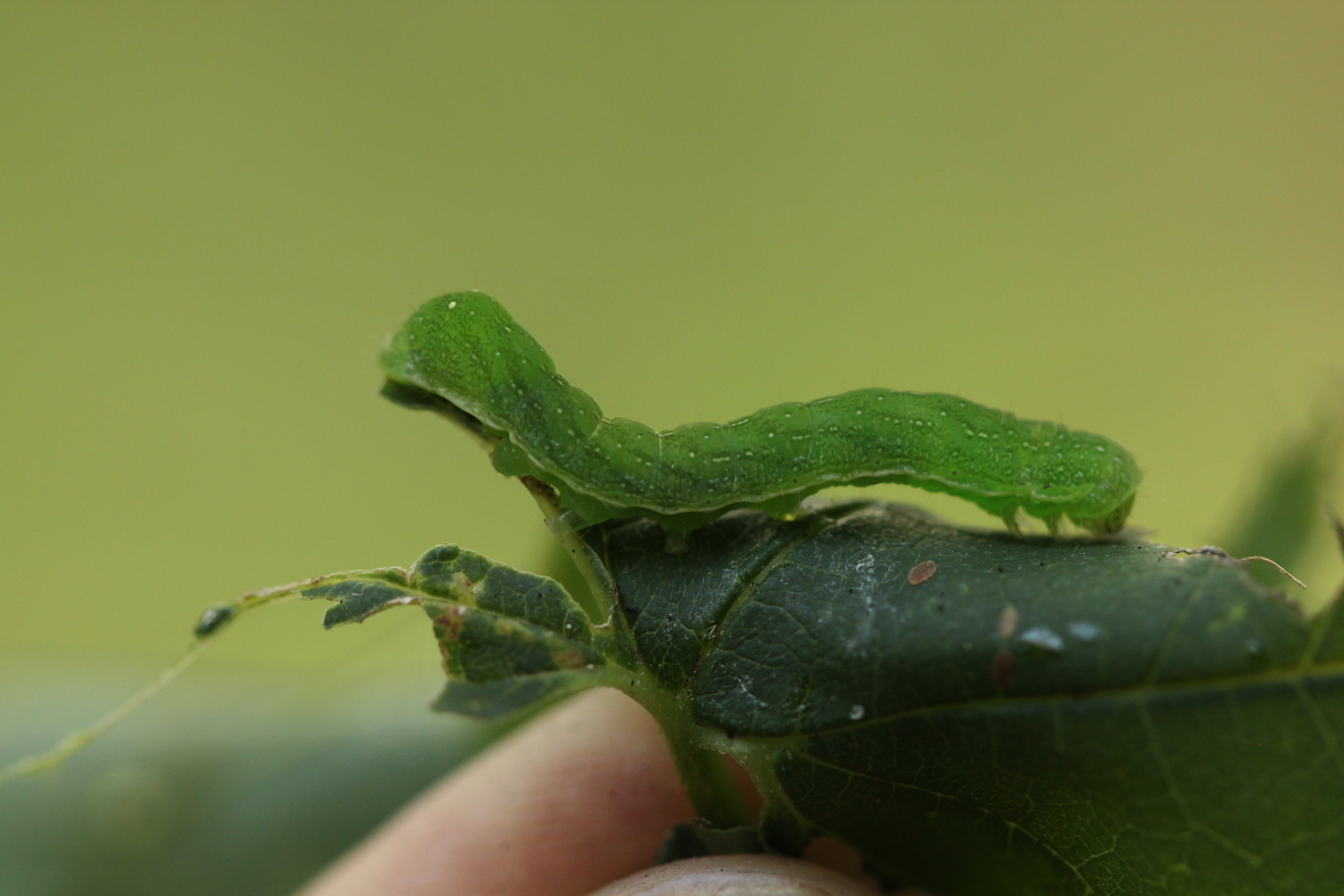 Raupe der Gelbfleck-Waldschatteneule (Euplexia lucipara) im Schwetzinger Hardt